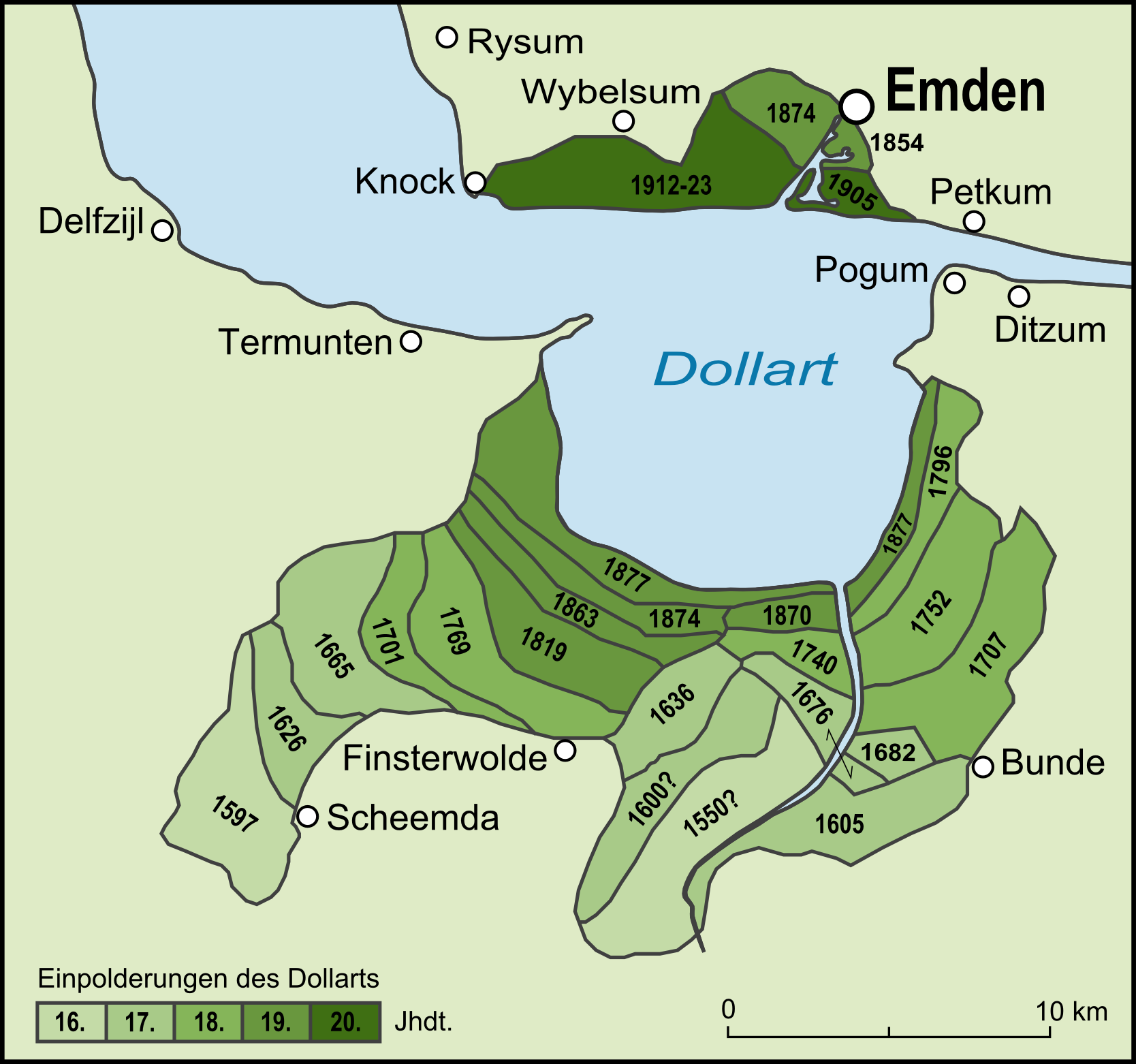 Ausdehnung des Dollarts und Landrückgewinnungen durch Einpolderung in den letzten fünf Jahrhunderten